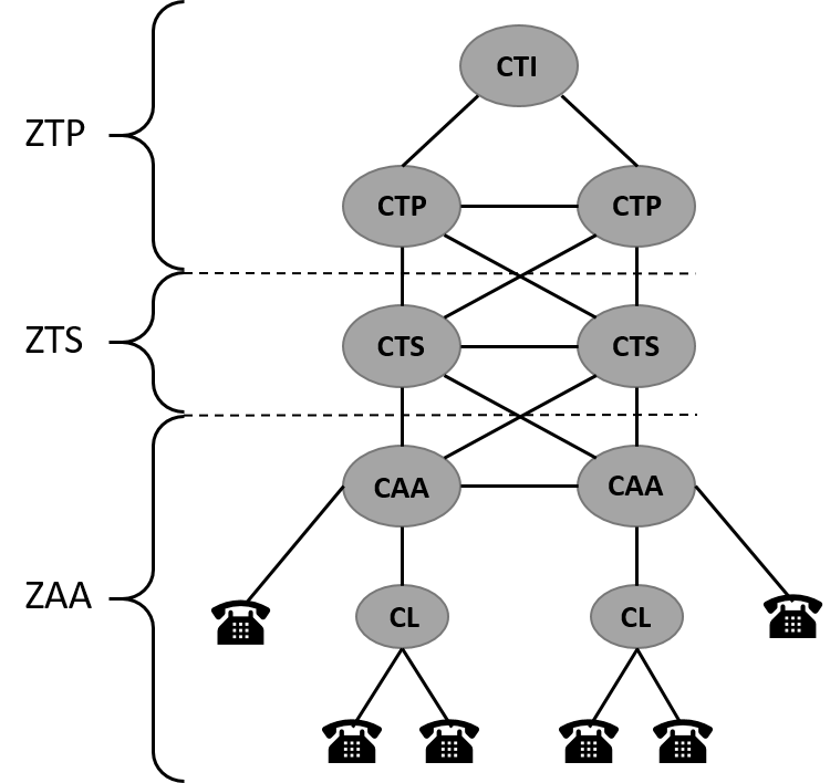 Schéma simplifié du réseau téléphonique commuté